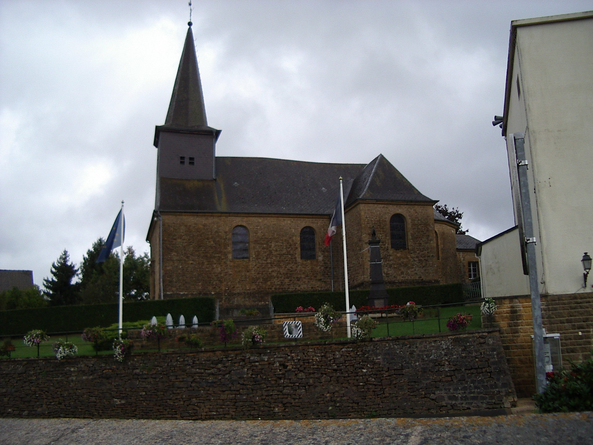 Eglise Saint-Brice est située à Lumes dans le departement des ardennes en France